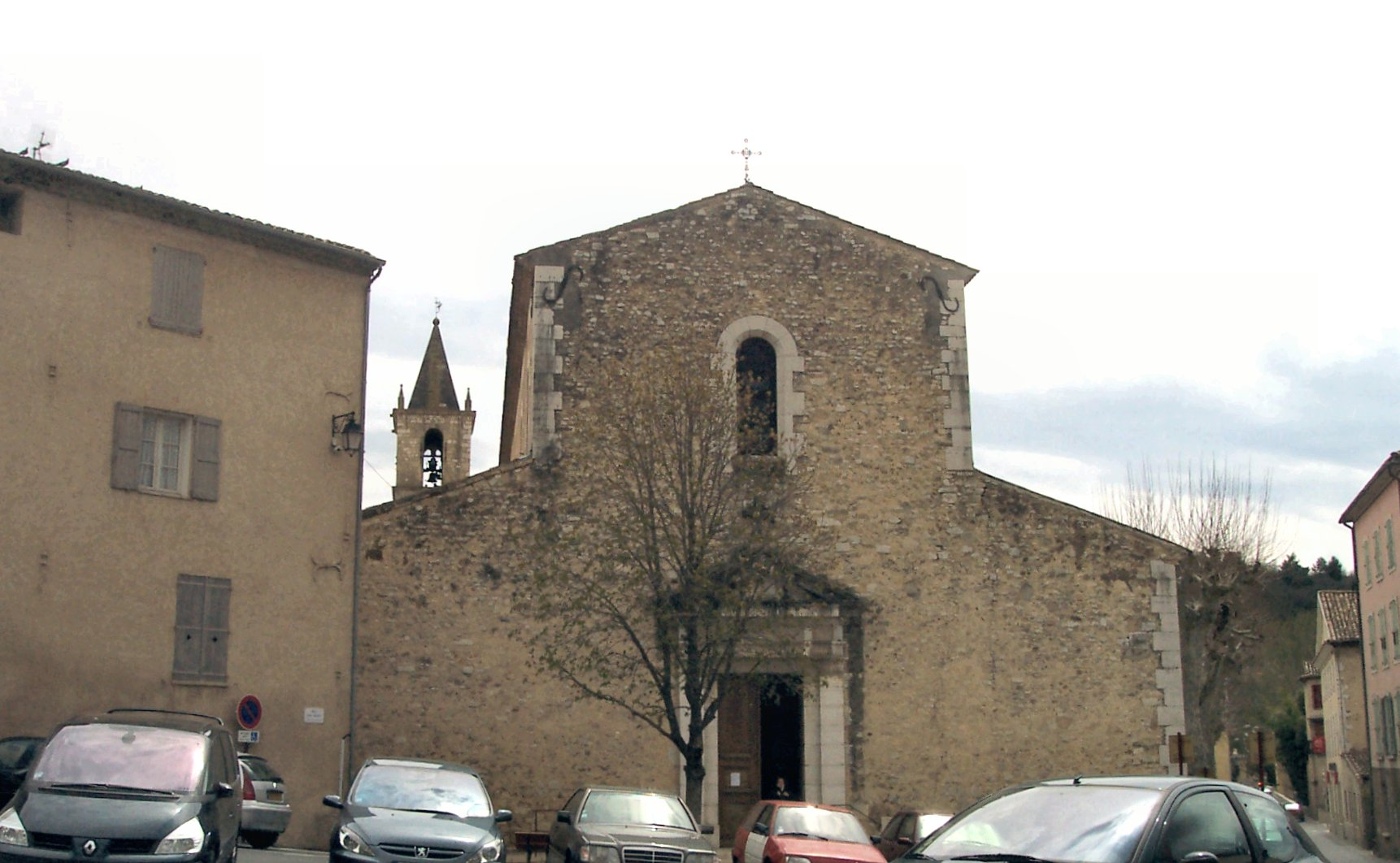 Église Notre-Dame de l'Assomption de Riez (façade principale et clocher), ancienne cathédrale Notre-Dame-de-la-Sède, reconstruite au milieu du XIXe.